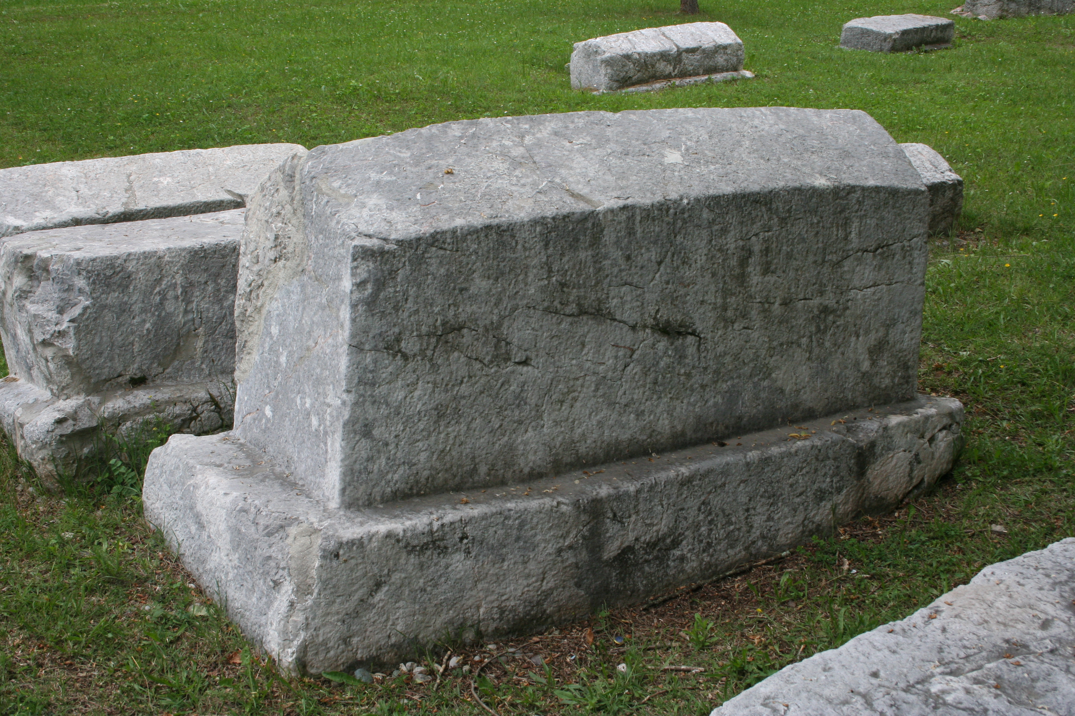 Mramorje u Perućcu